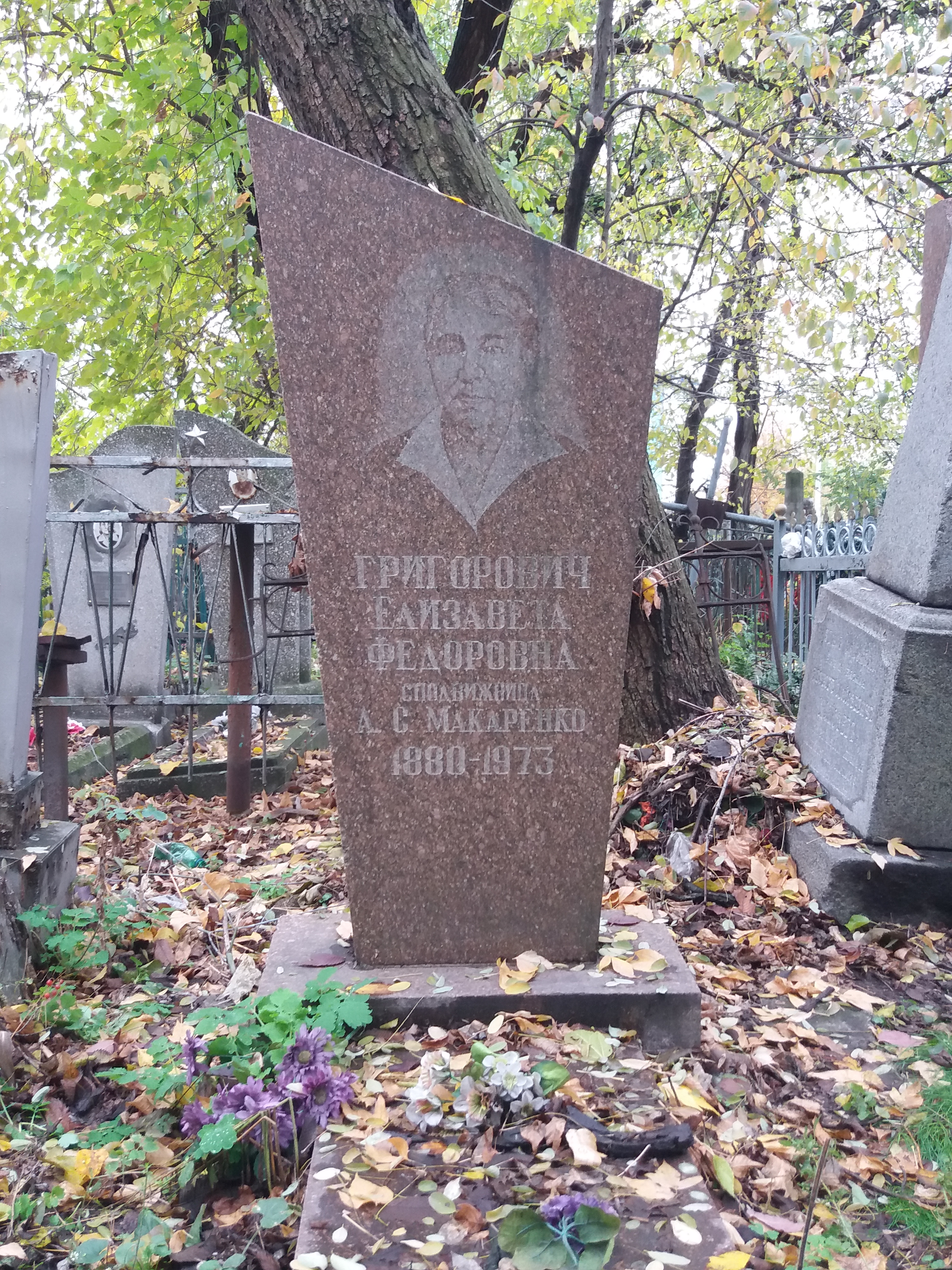 Крюківське кладовище (м. Кременчук). Могила Єлизавети Федорівни Григорович